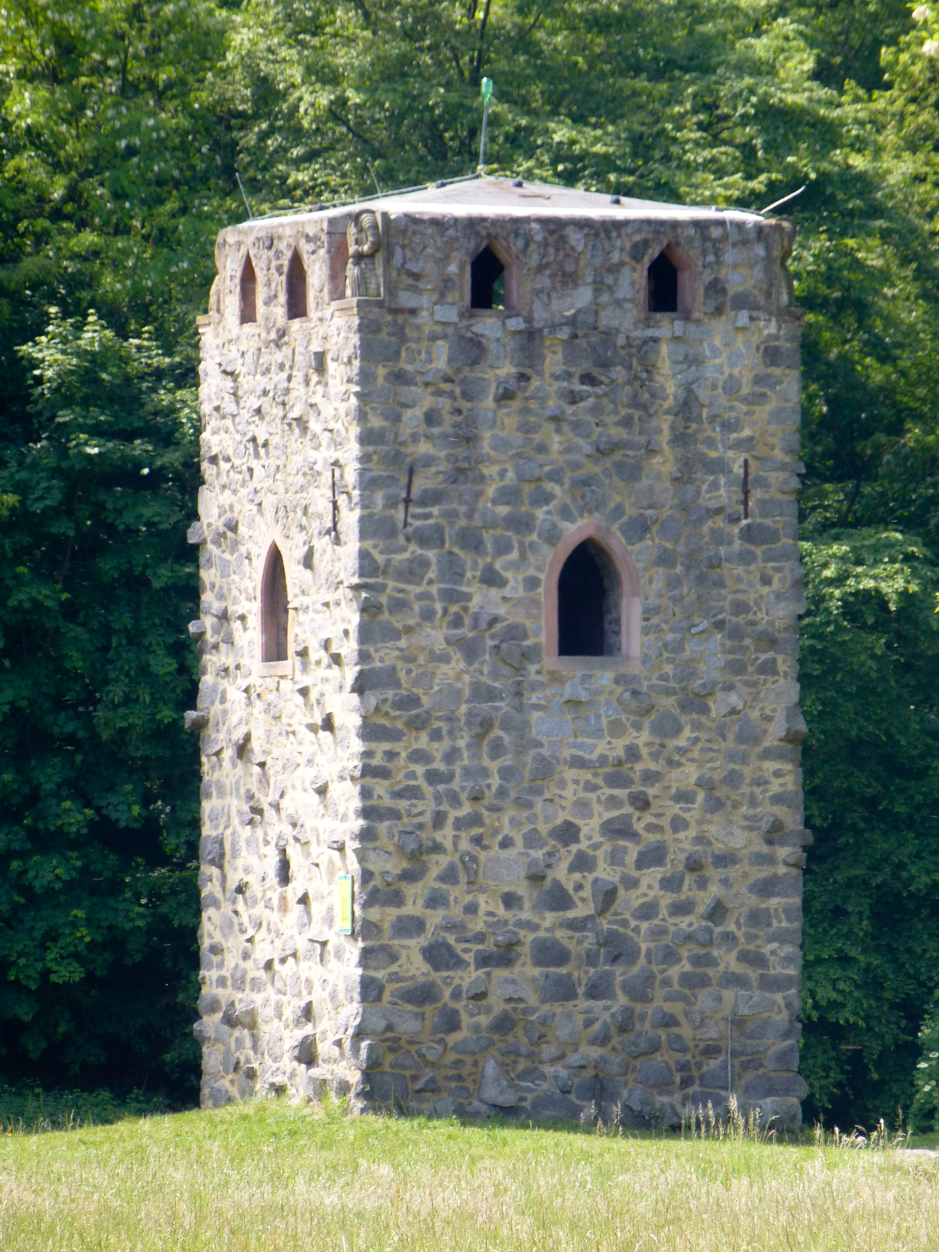 Waldnerturm